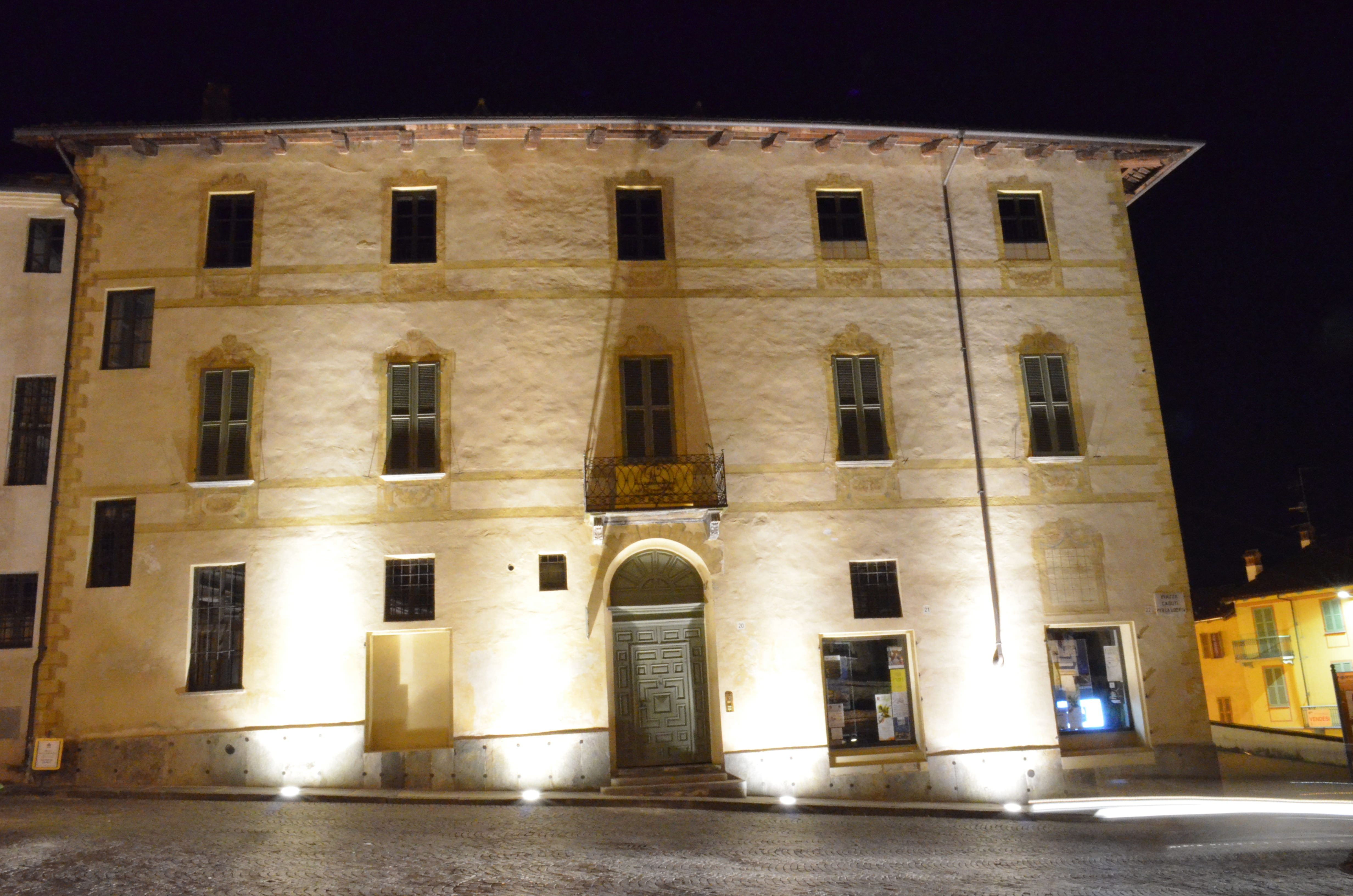 Palazzo Mathis Bra This is a photo of a monument which is part of cultural heritage of Italy.